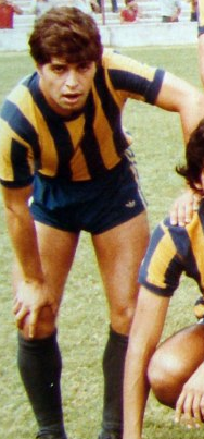 Roberto Settecase en primera división de Rosario Central, año 1980